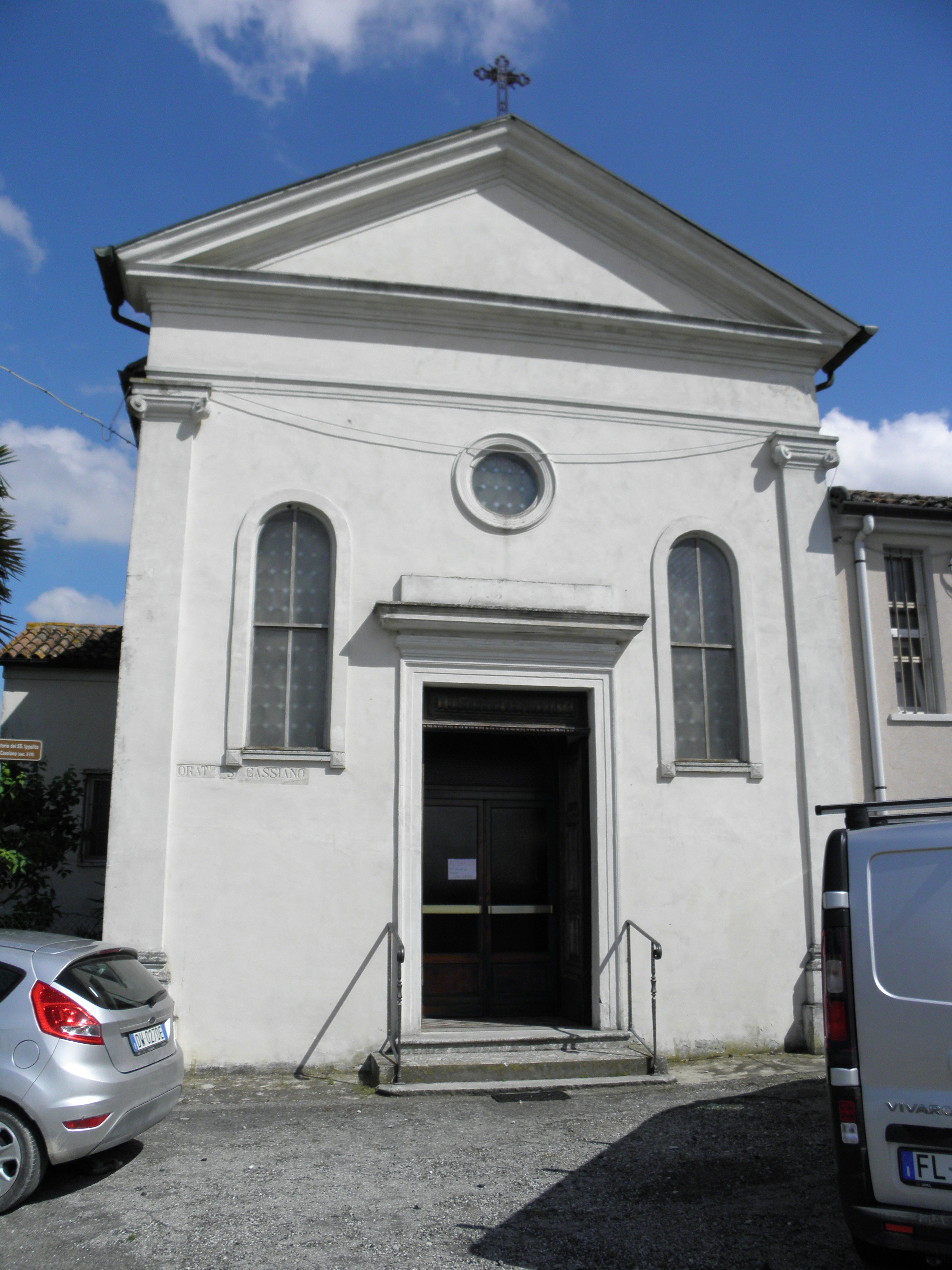 San Cassiano, frazione di Crespino: chiesa (o oratorio) dei Santi Ippolito e Cassiano.